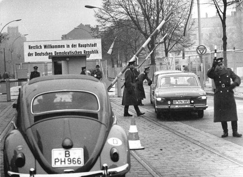 Zentralbild Hesse Kn-Zi 31.10.1964 Vertrag zum Passierscheinabkommen 1964 Auch am Übergang Invalidenstrasse... war am 31. Oktober 1964 eine reibungslose Abfertigung. Wie an den anderen Übergängen zur Hauptstadt der DDR kam es auch hier zu keinerlei Stauungen und langen Wartezeiten.